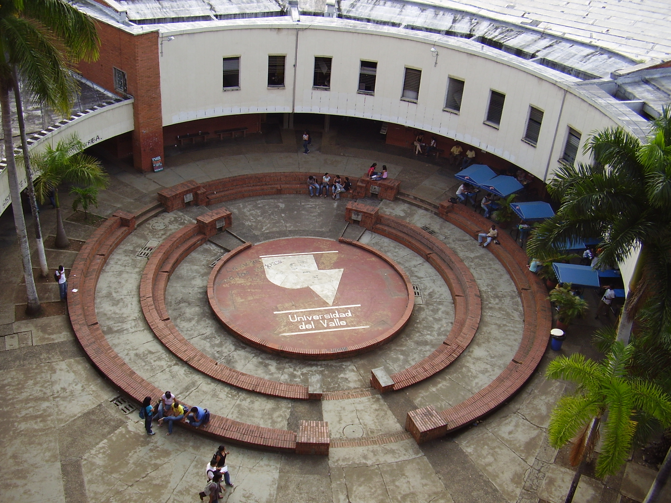 plazoleta de ingenierias univalle desde la torre de ingenierias